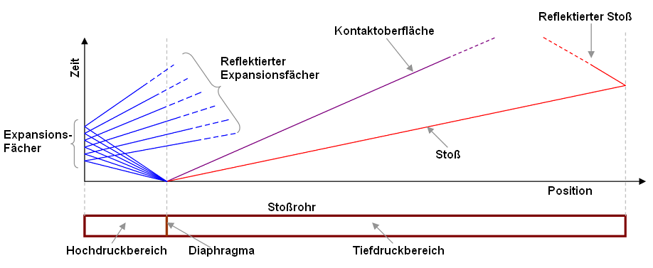 Die Abbildung zeigt die verschiedenen Wellen die sich in einem Stoßrohr bilden. Die Interaktion zwischen den Expansionsfächer und dem reflektierten Expansionsfächer wird nicht berücksichtigt.